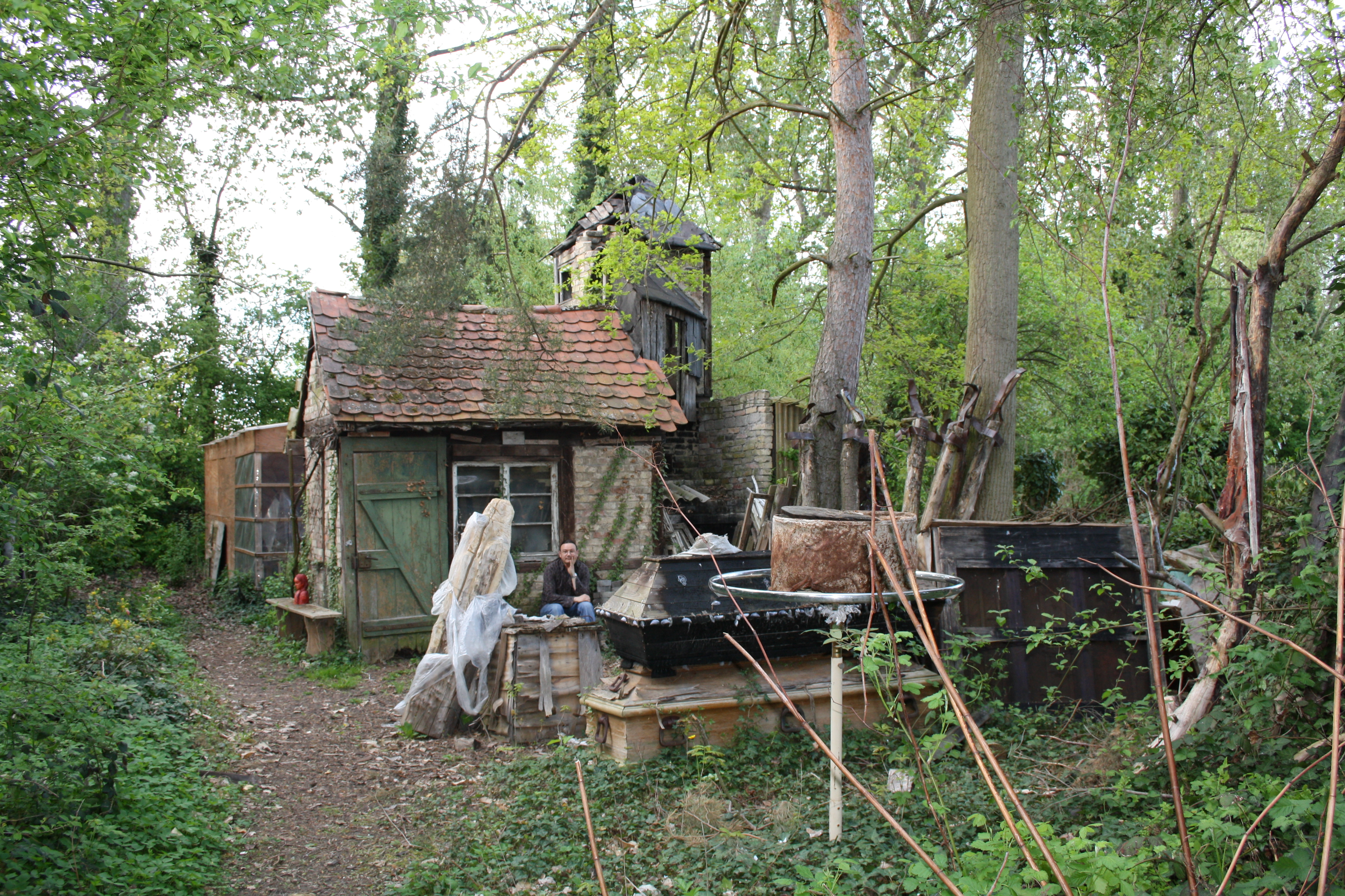 Martin Eckrich vor seinem Gartenhaus in Schifferstadt. Das Gartenhaus ist der Schlusspunkt des langen verwunschenen Gartens von Eckrich und steht kurz vorm Rehbach. Der Sarg im Vordergrund war Requisit bei Kunstaktionen.